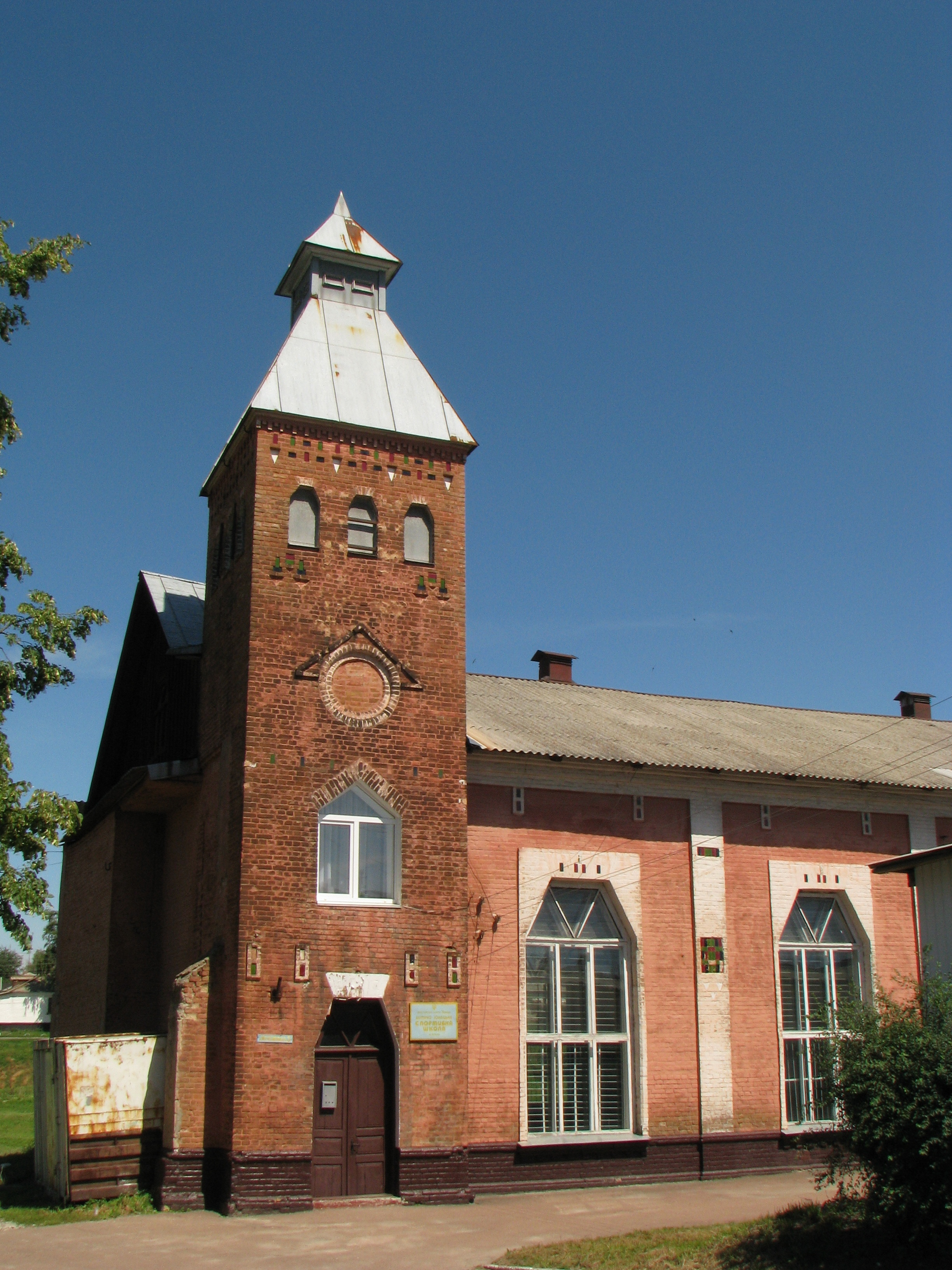 Будинок електростанції (1914). Зараз -- Дитячо-юнацька спортивна школа